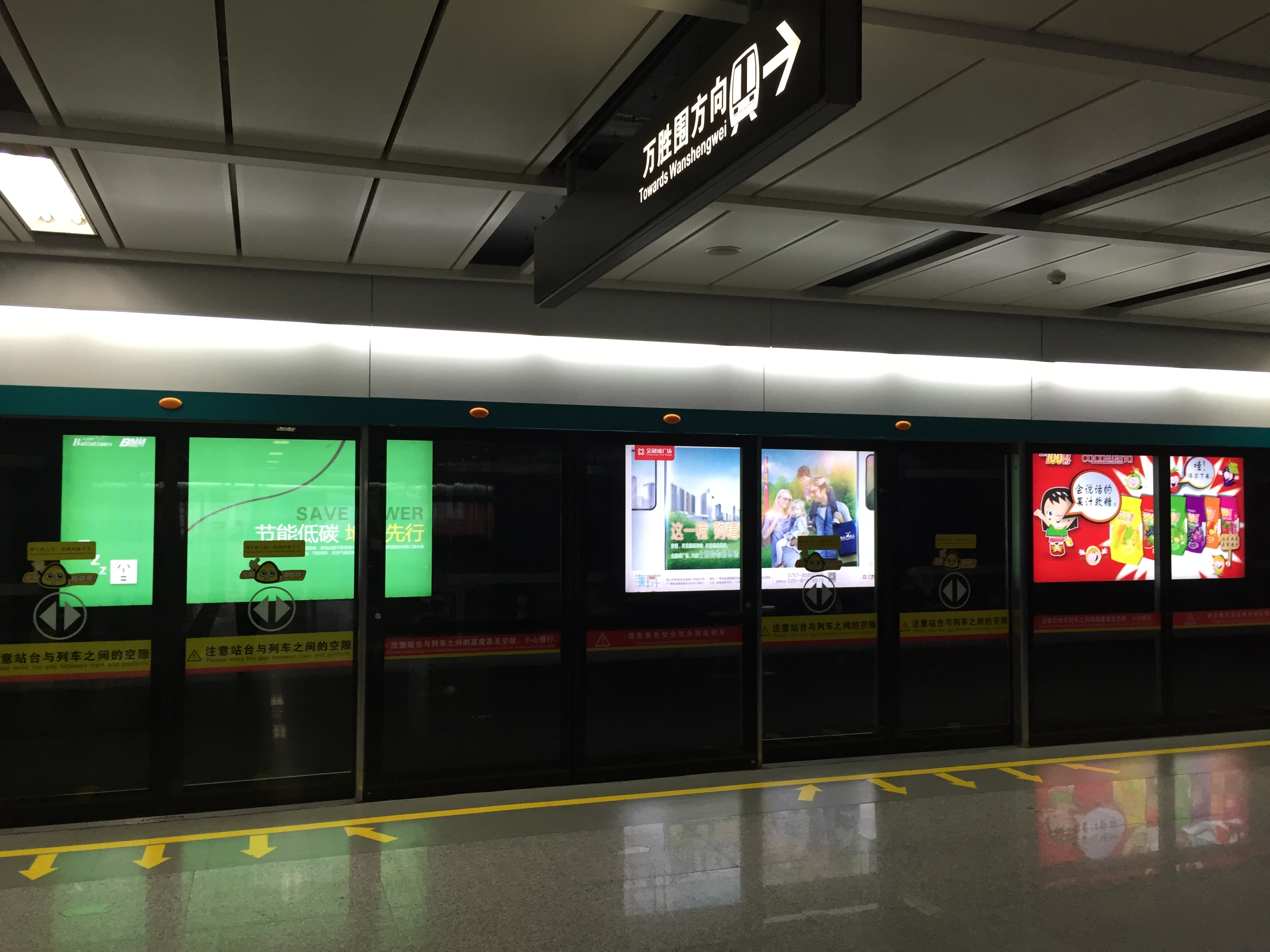 广州地铁凤凰新村站